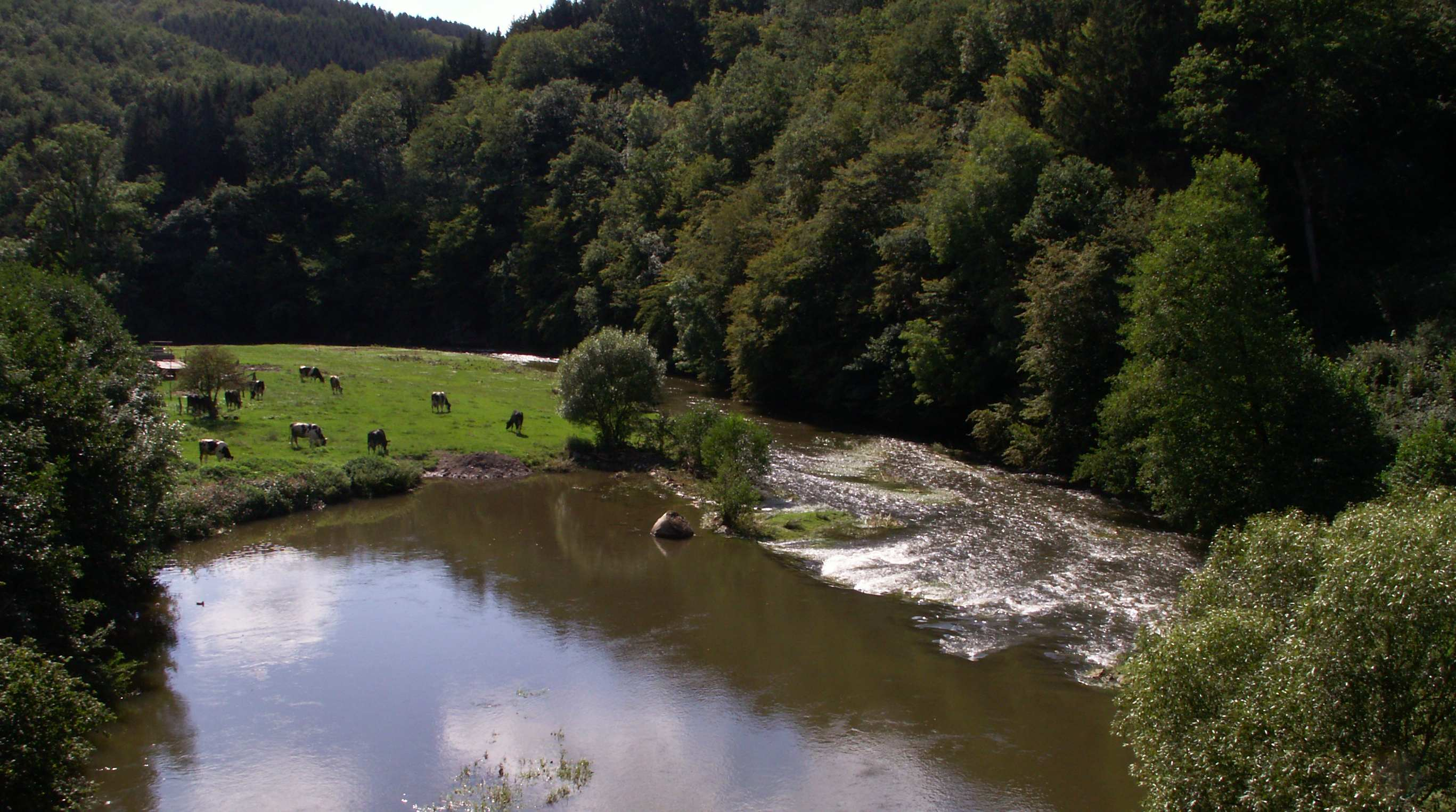 Die Prüm bei Waxweiler. Blick von der alten Eisenbahnbrücke der Westeifelbahn unmittelbar nördlich Waxweilers. Koordinaten: 50° 5'54.96"N, 6°21'8.68"O, Blickrichtung SW